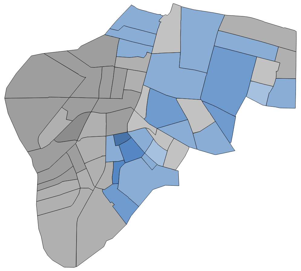 中文（台灣）: 顏色對照表